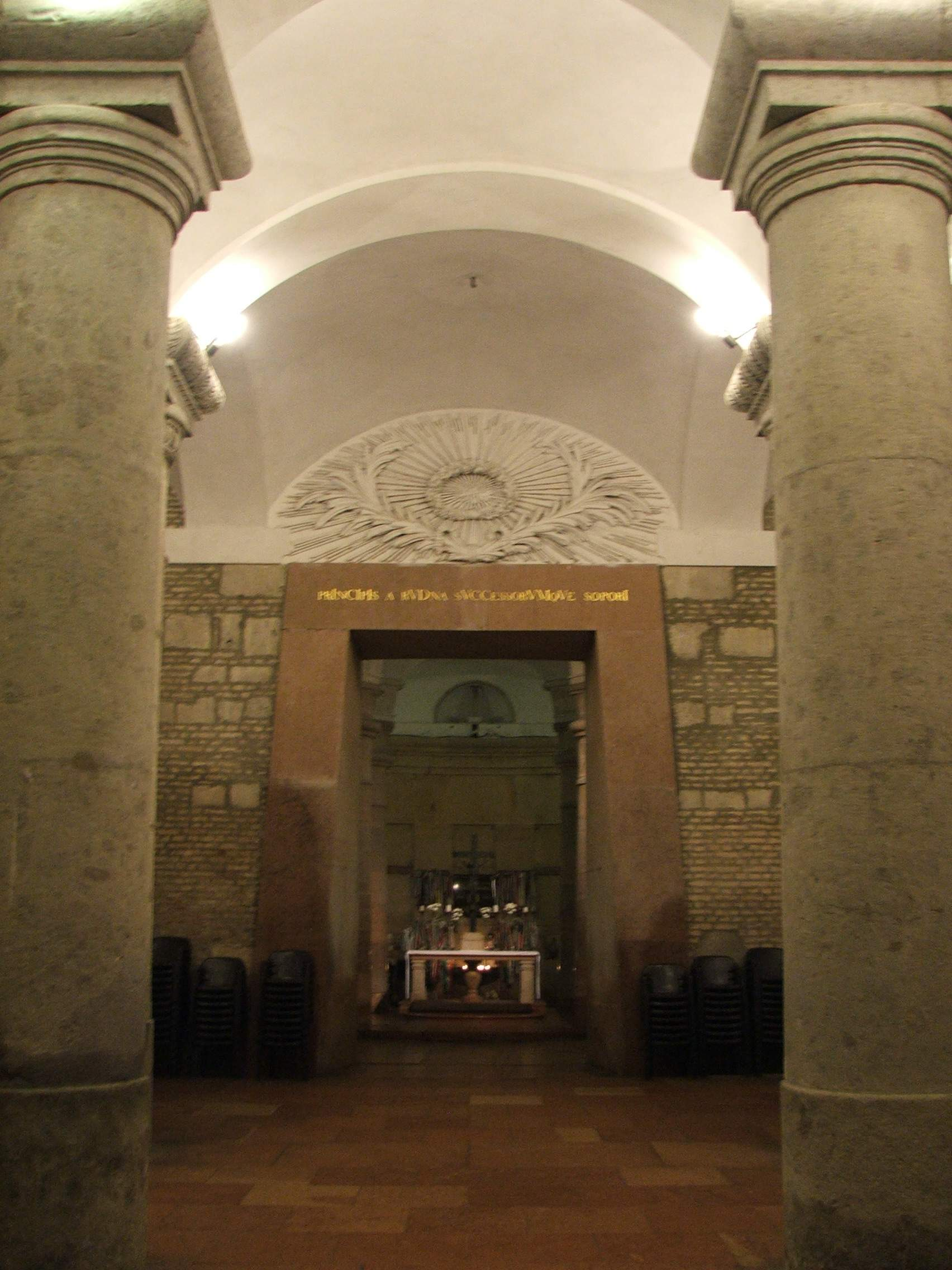 A bazilika altemplomának bejárata